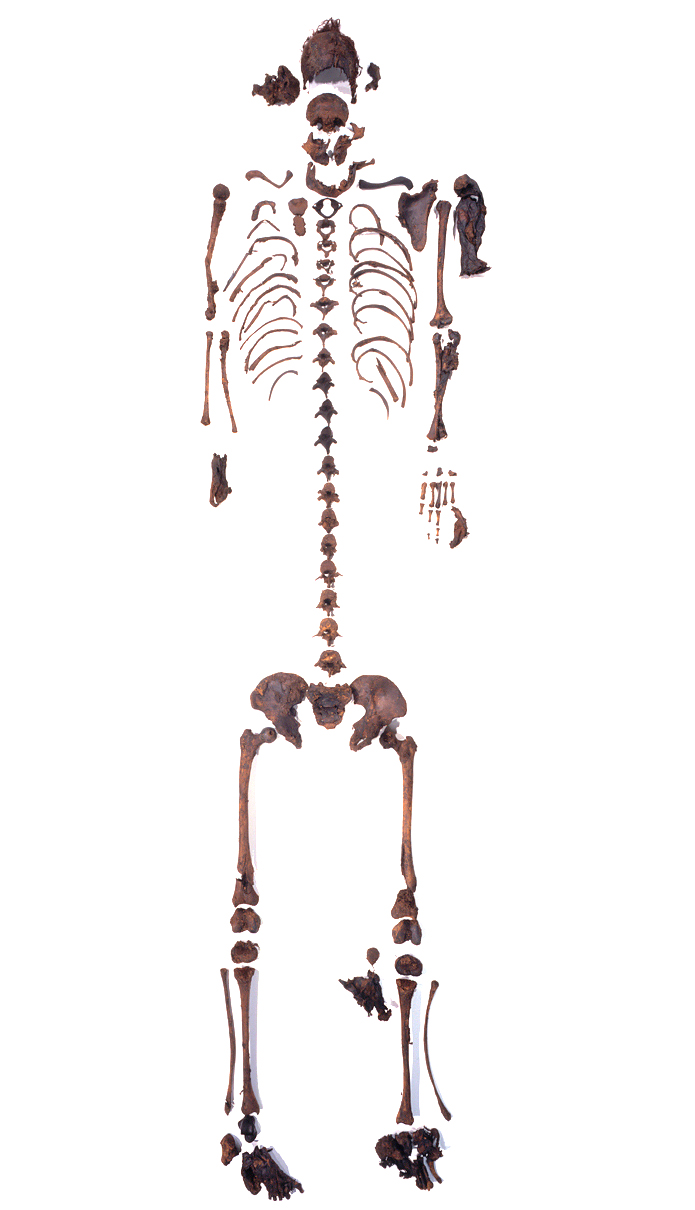 Bild vom Niedersächsisches Landesamt für Denkmalpflege als Rechteinhaber an User:AxelHH per Mail am 21.01.11 auf Anfrage übersandt und Wikipedia zur Verfügung gestellt, Mail liegt mir vor.